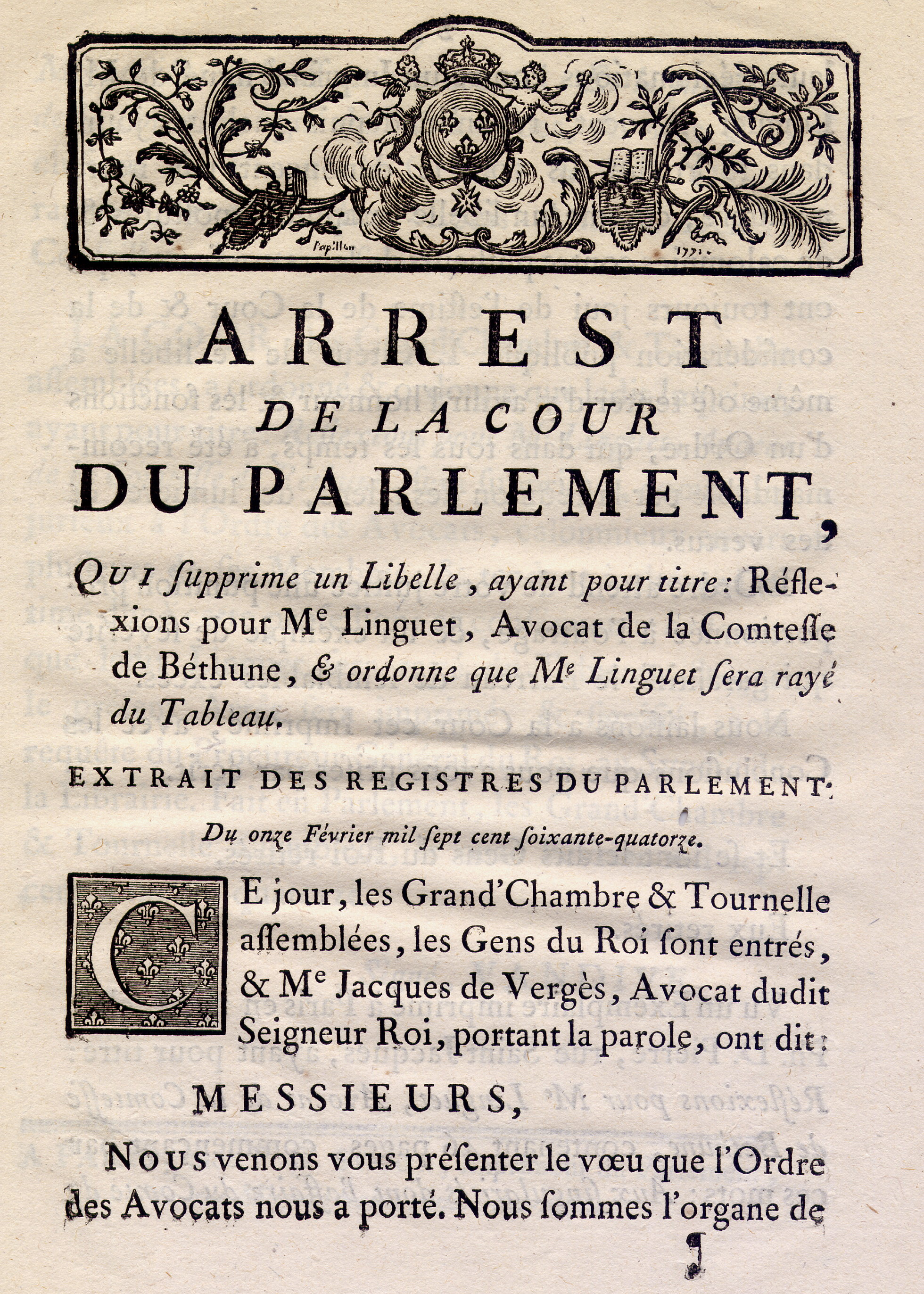 Arrêt de la Cour du Parlement de Paris, contre un libelle de Linguet, 11 février 1774 page 1. Arrest de la Cour du Parlement qui supprime un libelle de Linguet et le raye du Tableau, 11 février 1774, signé Nicolas Félix Vandive, page 1/3. Avocat général Jacques de Vergès.